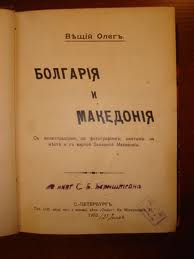 Богаррия и Македония